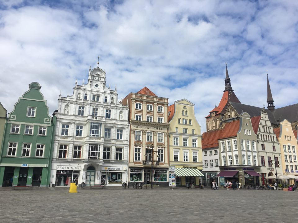 Centro de Rostock